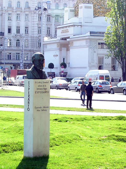 Zamenhof-monumento en Vieno